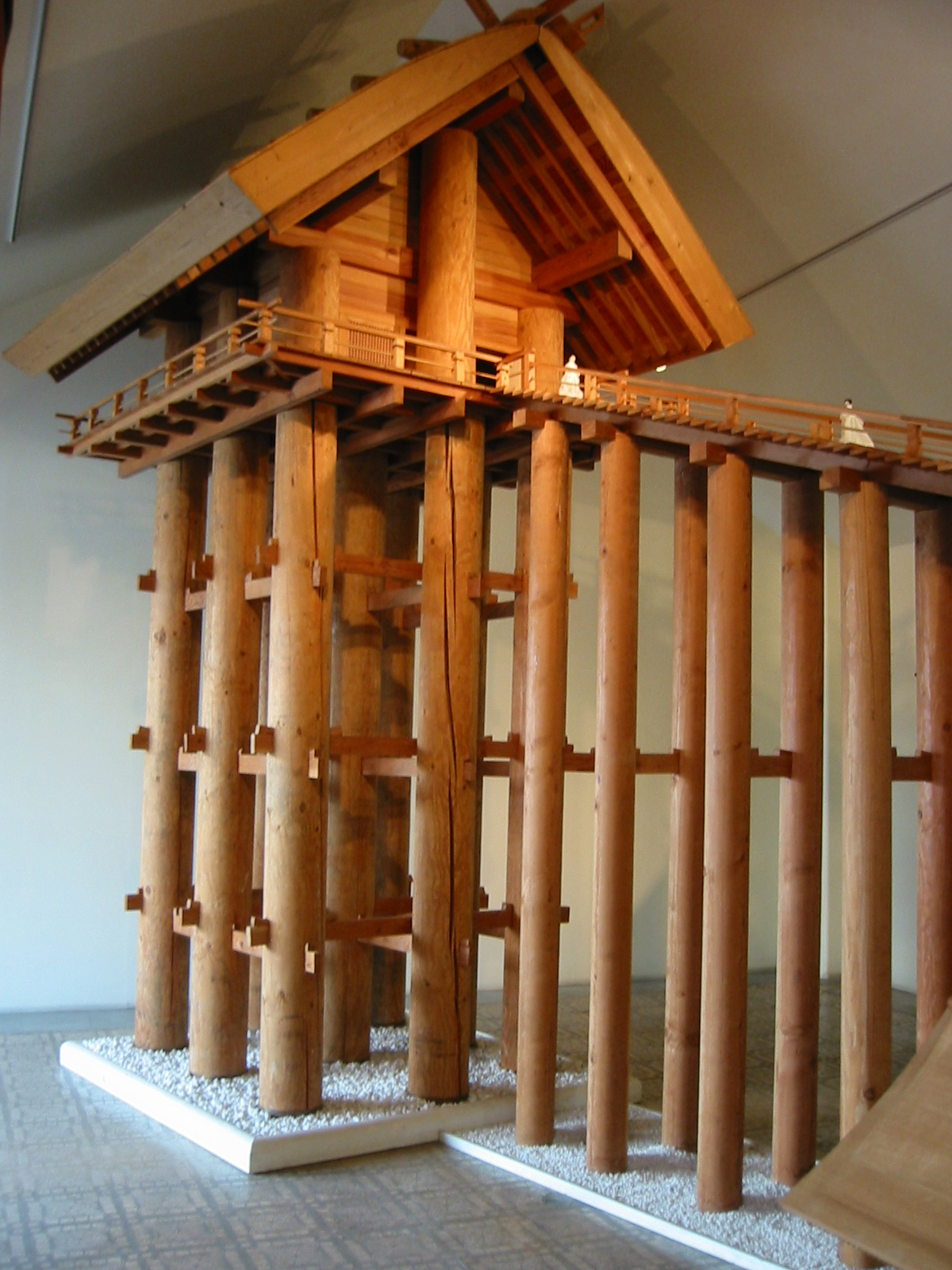 古代出雲大社模型 古代出雲大社模型展示館「雲太」(うんた)にて